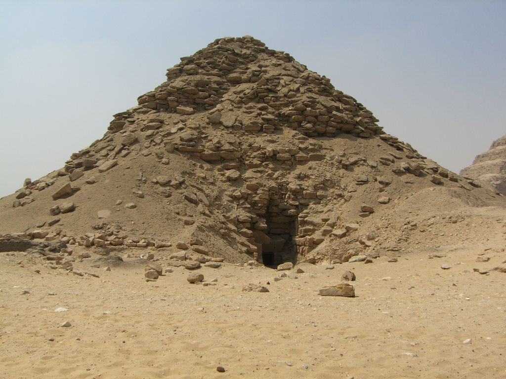 Vue de la face nord de la pyramide d'Ouserkaf avec l'accès aux appartements funéraires souterrains - Saqqarah - Ve dynastie égyptienne